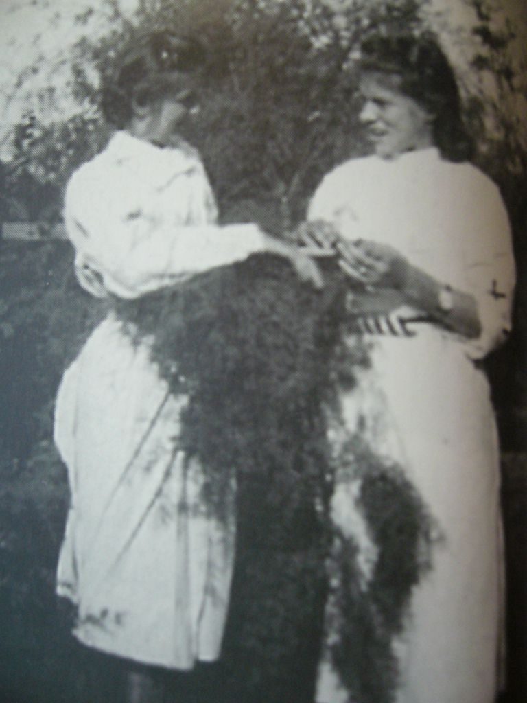 Harcerki wypełniające obowiązki pielęgniarek w szpitalu wojskowym w Gimnazjum im. Gen. J. H. Dąbrowskiego Kutnie we wrześniu 1939r. Przed dyżurem Maria Kałużna-Krzemińska (od lewej) i Janina Jabłońska.